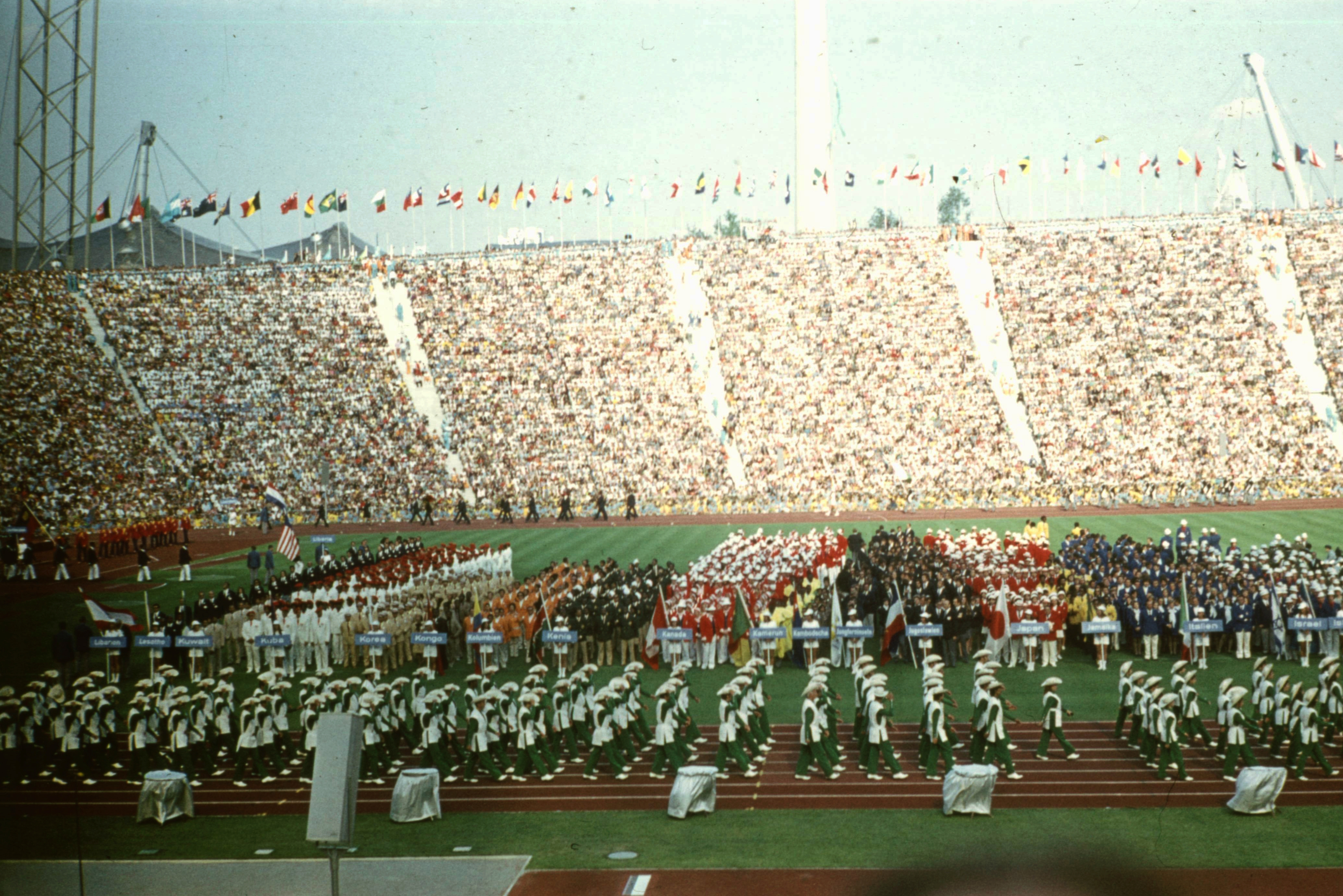 Olimpiai Stadion, az olimpia megnyitóünnepsége. Location: Germany, Munich Tags: FRG, Olympics, colorful, sportsperson Title: Olimpiai Stadion, az olimpia megnyitóünnepsége.